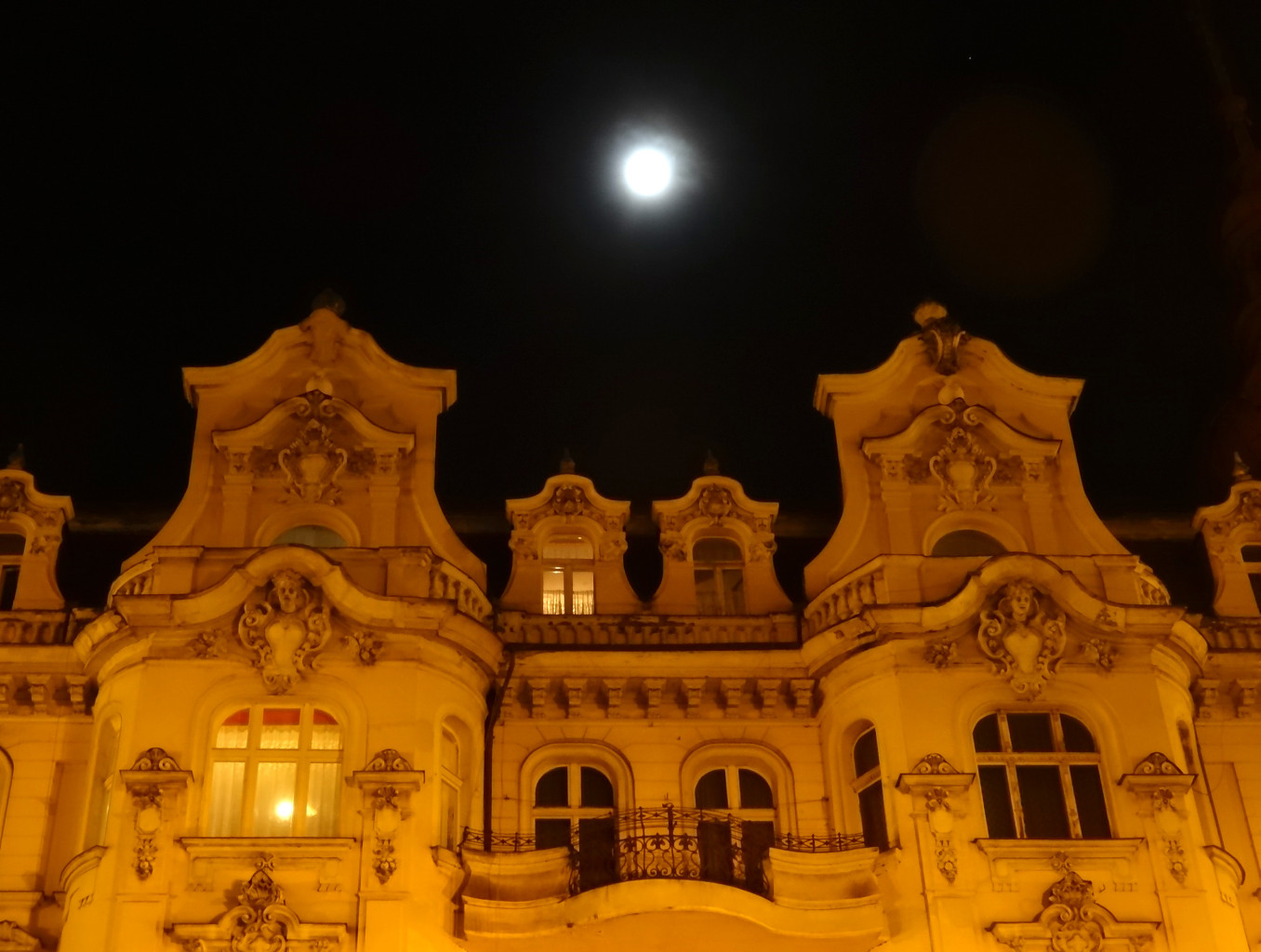 Kamienica Plac Wolności 1 w Bydgoszczy, róg ul. Gdańskiej (1898, aut. Józef Święcicki)